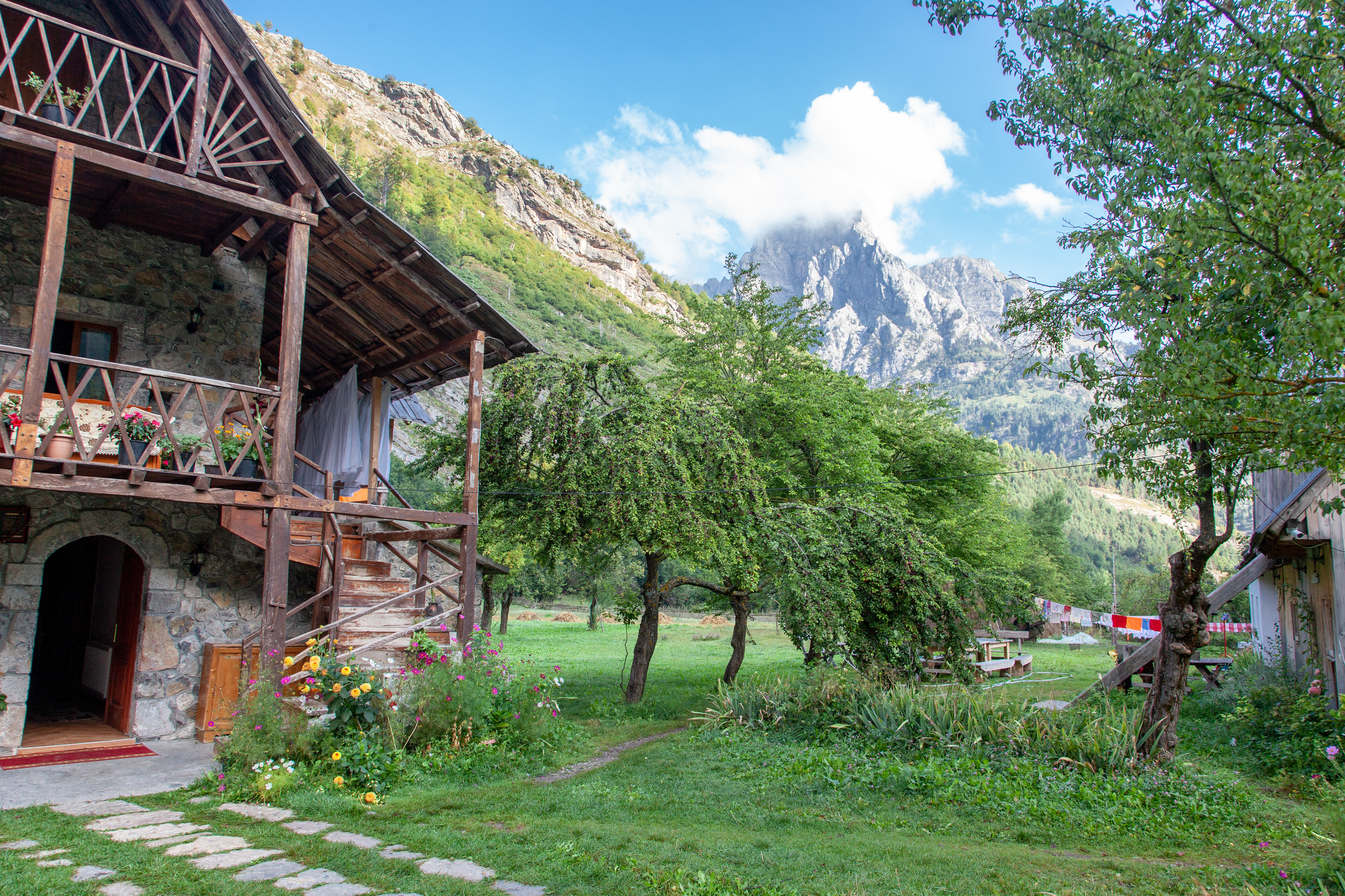 Avec la vallée de Theth, celle de la Valbonë constitue l'un des deux attraits majeurs des Alpes albanaises. Parsemée de villages typiques du nord du pays, avec leurs "kulla" en bois et en pierre, cette vallée est un véritable bout du monde.